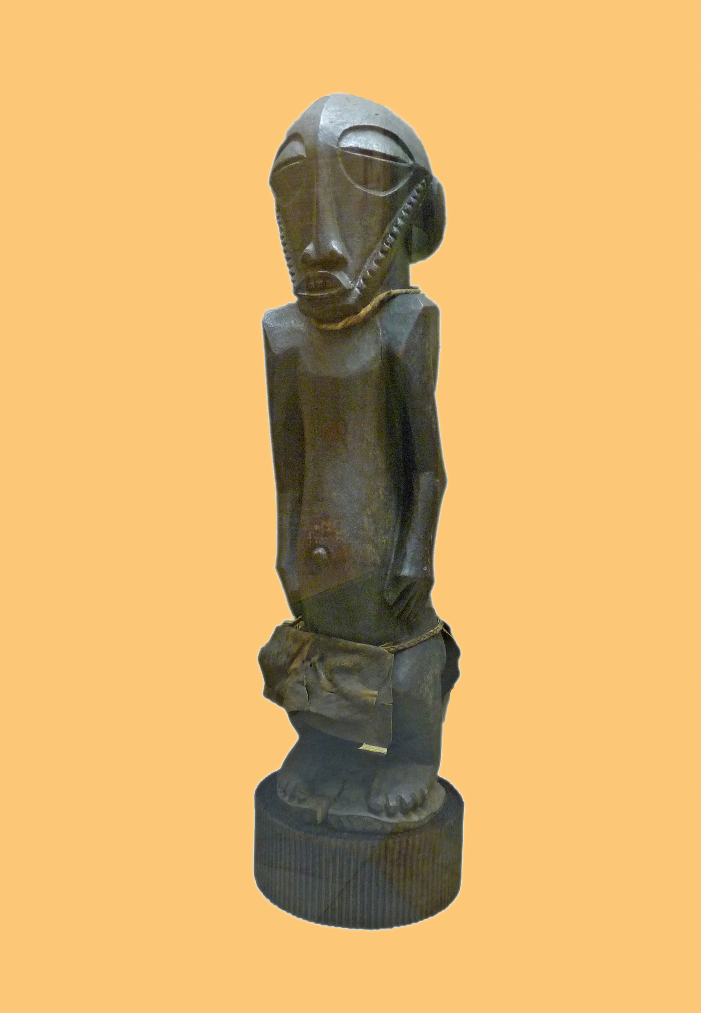 Figure masculine Bainda/Bakeci/Basu (pré-Bembe). Kivu oriental, Zaïre. Musée royal de l'Afrique centrale